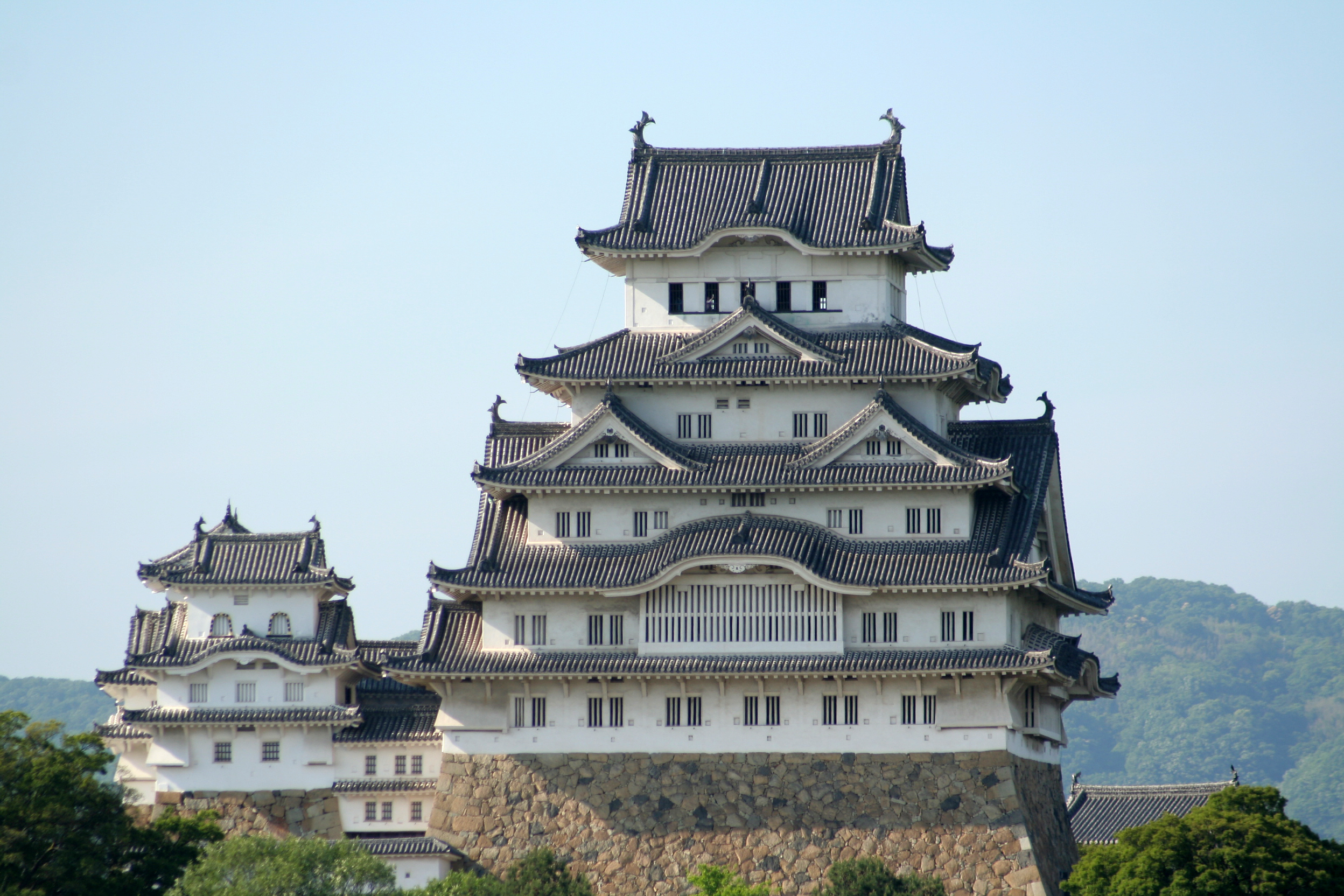 姫路城天守閣。イーグレ姫路屋上から撮影。